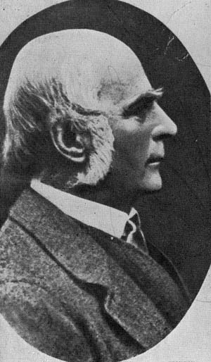 Гальтон, Фрэнсис